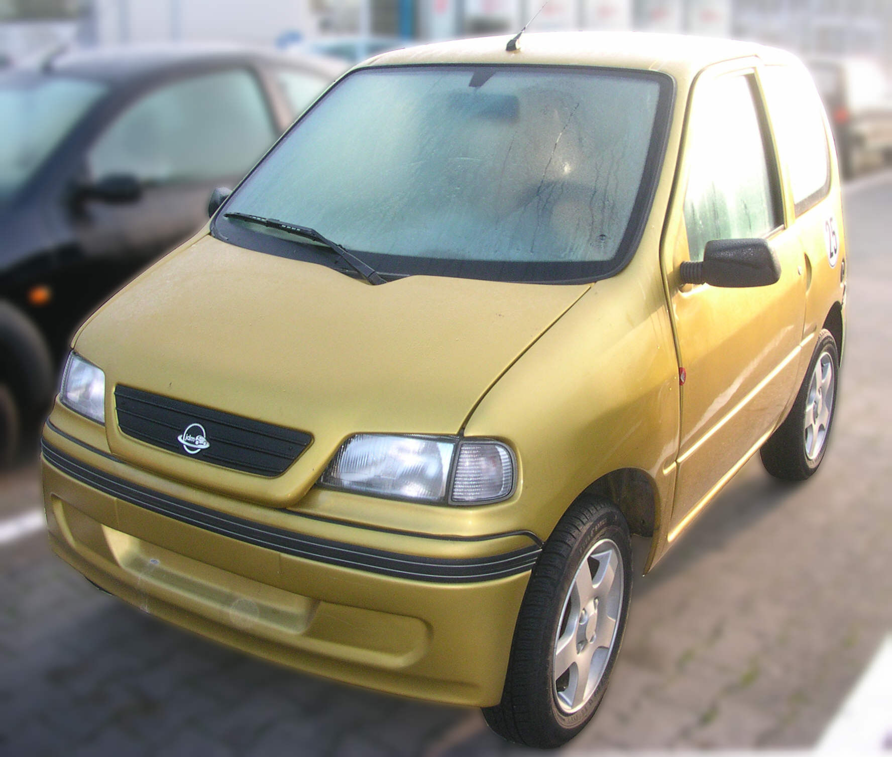 JDM Titane GLX Leichtkraftfahrzeug